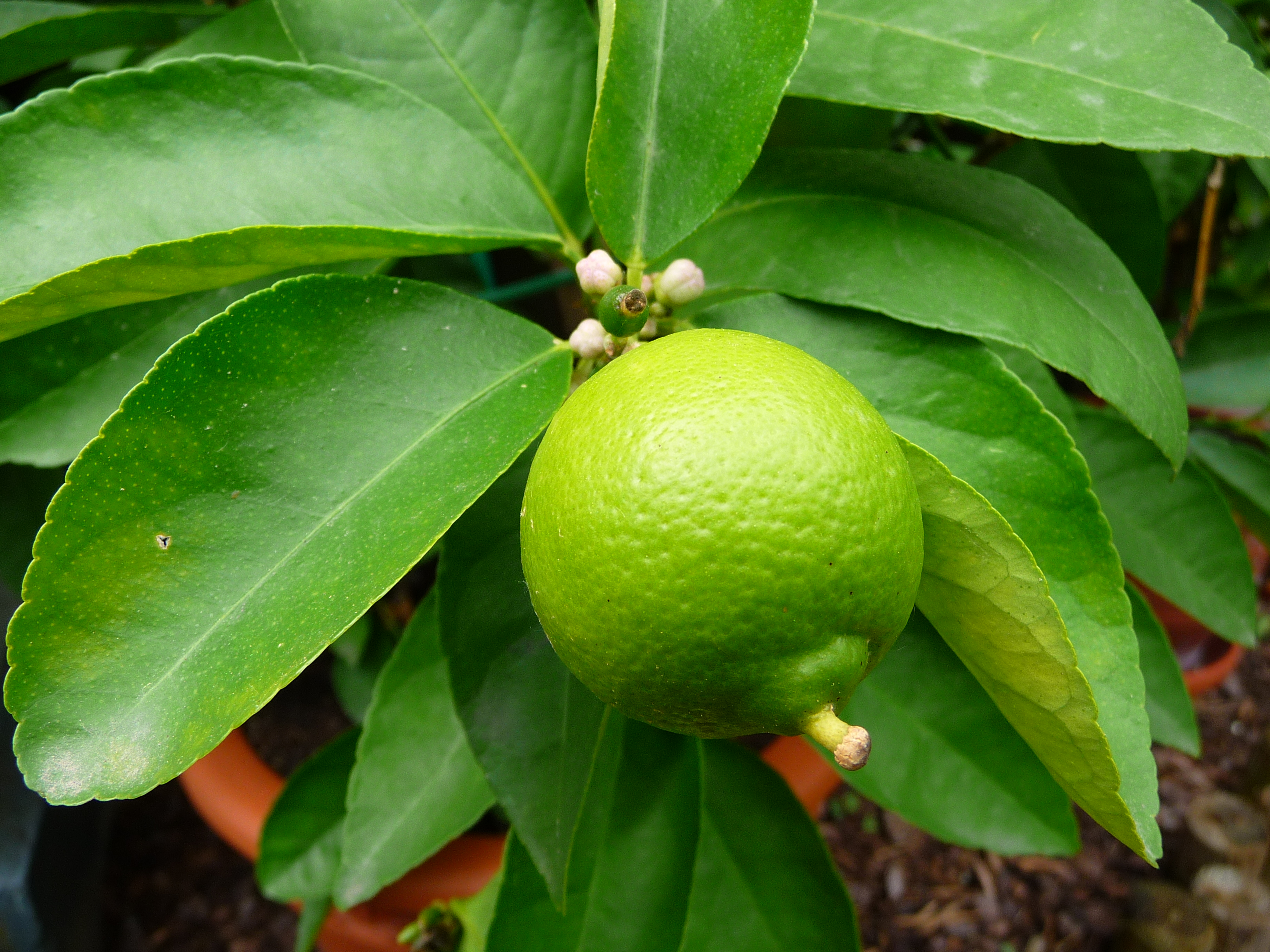 Unreife Zitrone am Baum (Citrus x limon)